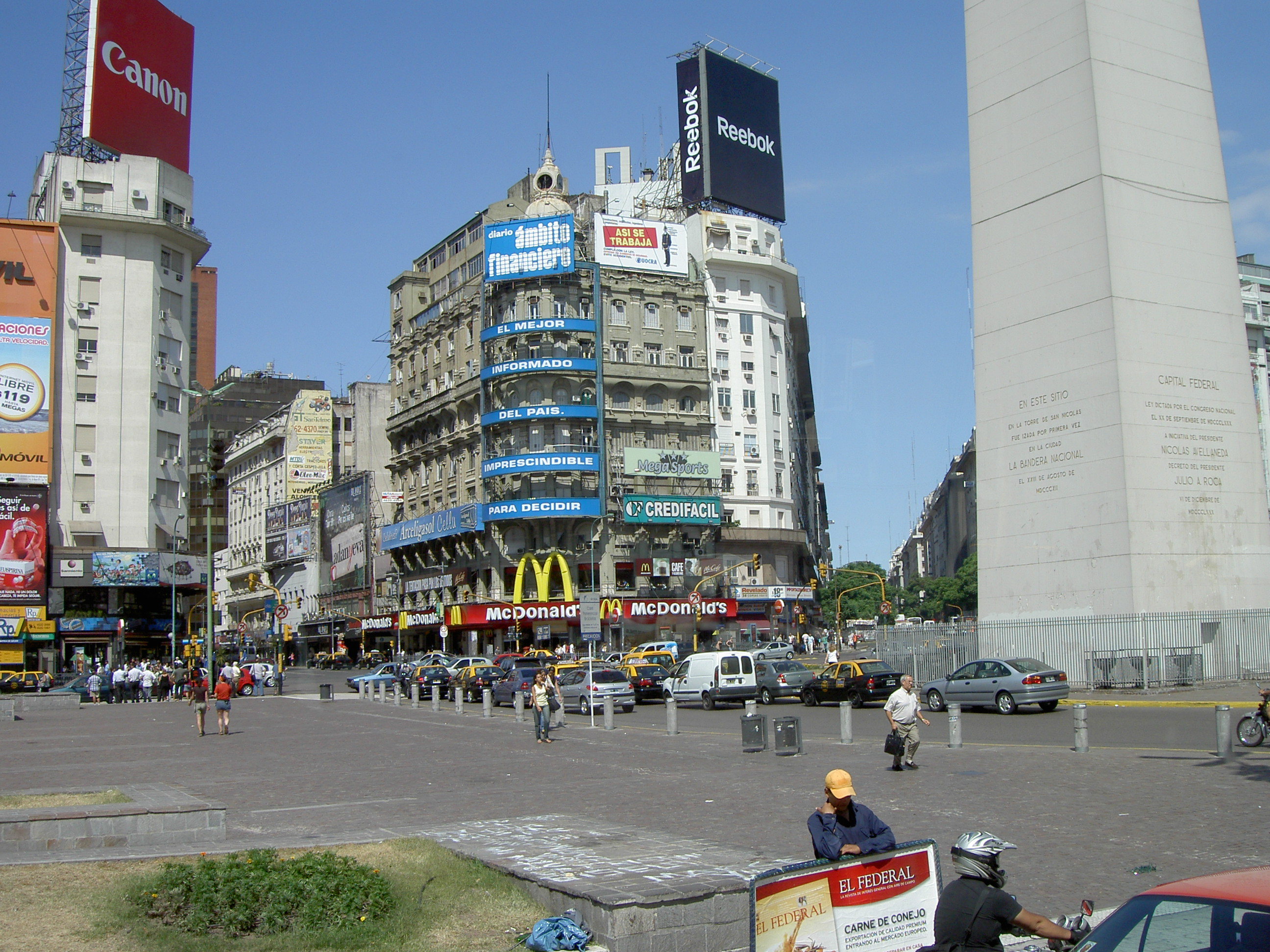 Avenida 9 de Julio, con el Obelisco